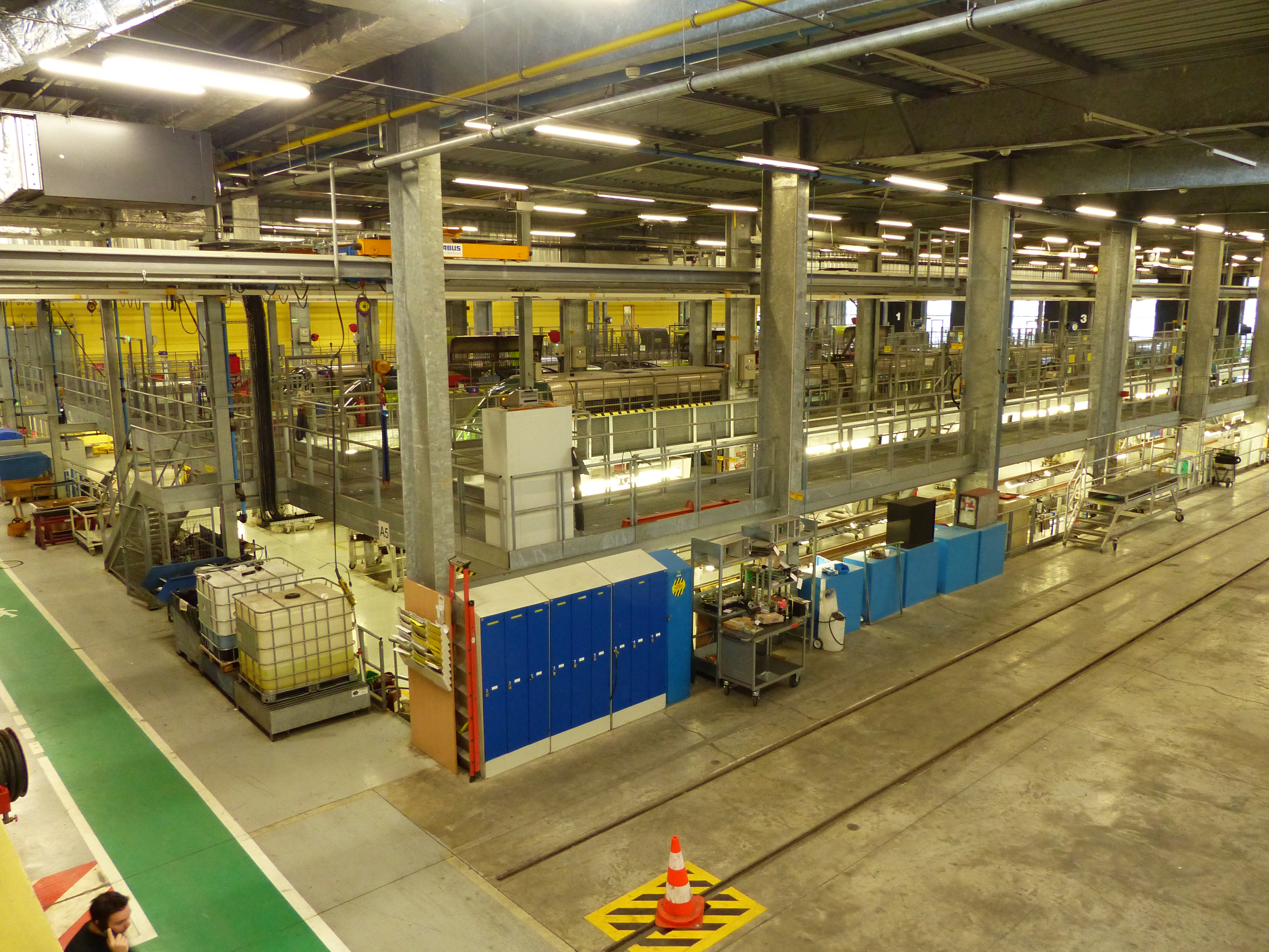 Atelier de réparation des tramways de Strasbourg. Site de la Kibitzenau.